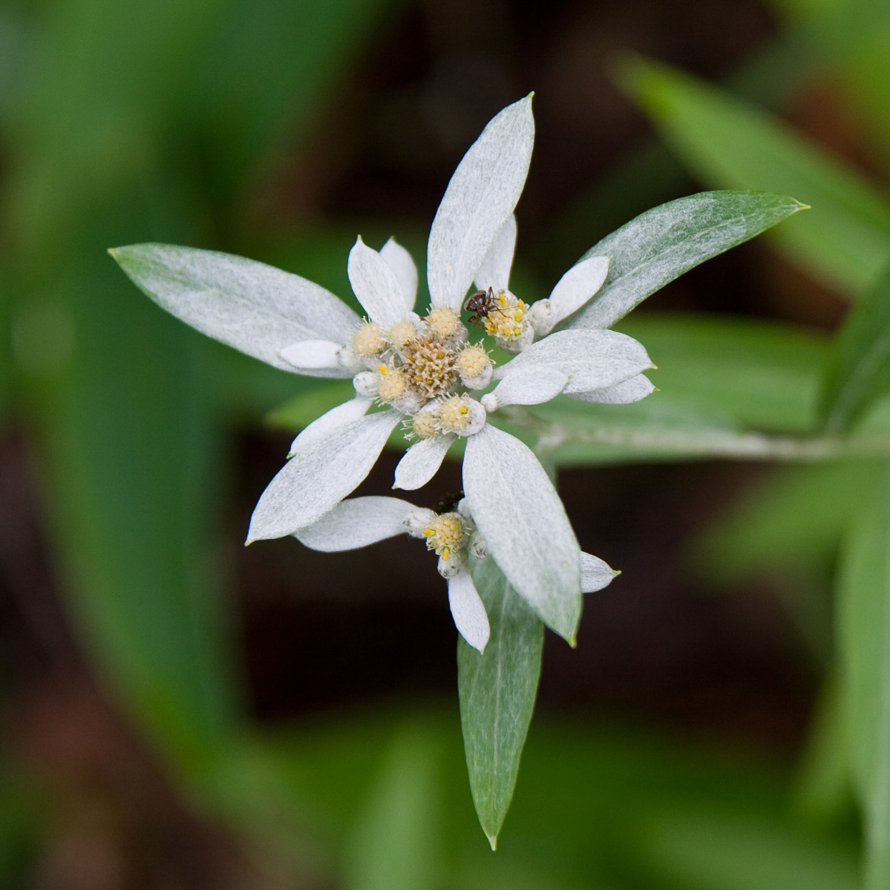 ウスユキソウ (学名:Leontopodium japonicum)